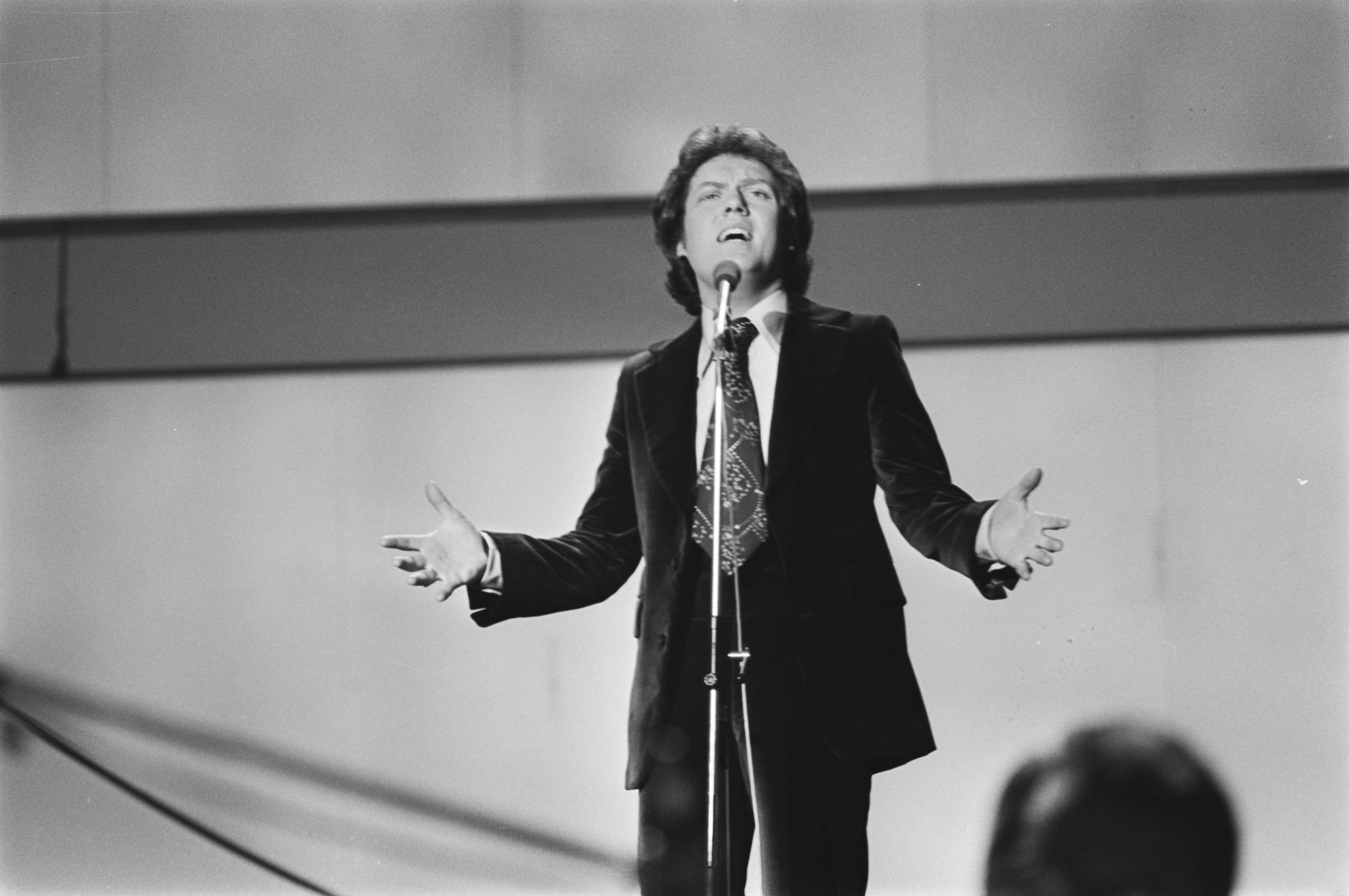 Collectie / Archief : Fotocollectie Anefo Reportage / Serie : [ onbekend ] Beschrijving : Eurovisie Songfestival 76 Den Haag ; Red Hurley (Ierland) Datum : 3 april 1976 Locatie : Den Haag, Ierland Trefwoorden : songfestivals Persoonsnaam : Eurovisie Songfestival Fotograaf : Mieremet, Rob / Anefo Auteursrechthebbende : Nationaal Archief Materiaalsoort : Negatief (zwart/wit) Nummer archiefinventaris : bekijk toegang 2.24.01.05 Bestanddeelnummer : 928-5033